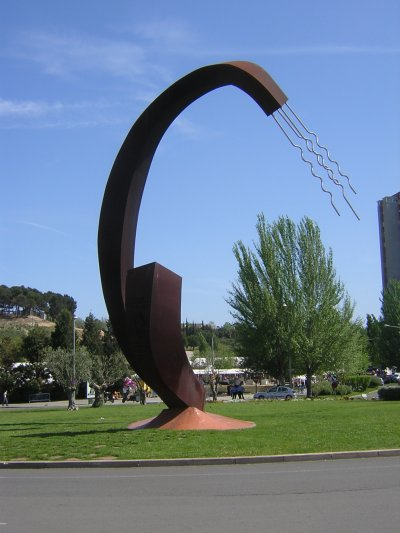 La C de Cerdanyola del Vallès, homenatge a Catalunya i a Lluís Companys. Obra del 1994 de l'escultor Salvador Mañosa i Jané (Cerdanyola del Vallès, 1945). La C originalment significava 'Companys', 'Catalunya', 'Cerdanyola' i 'confraternitat'.